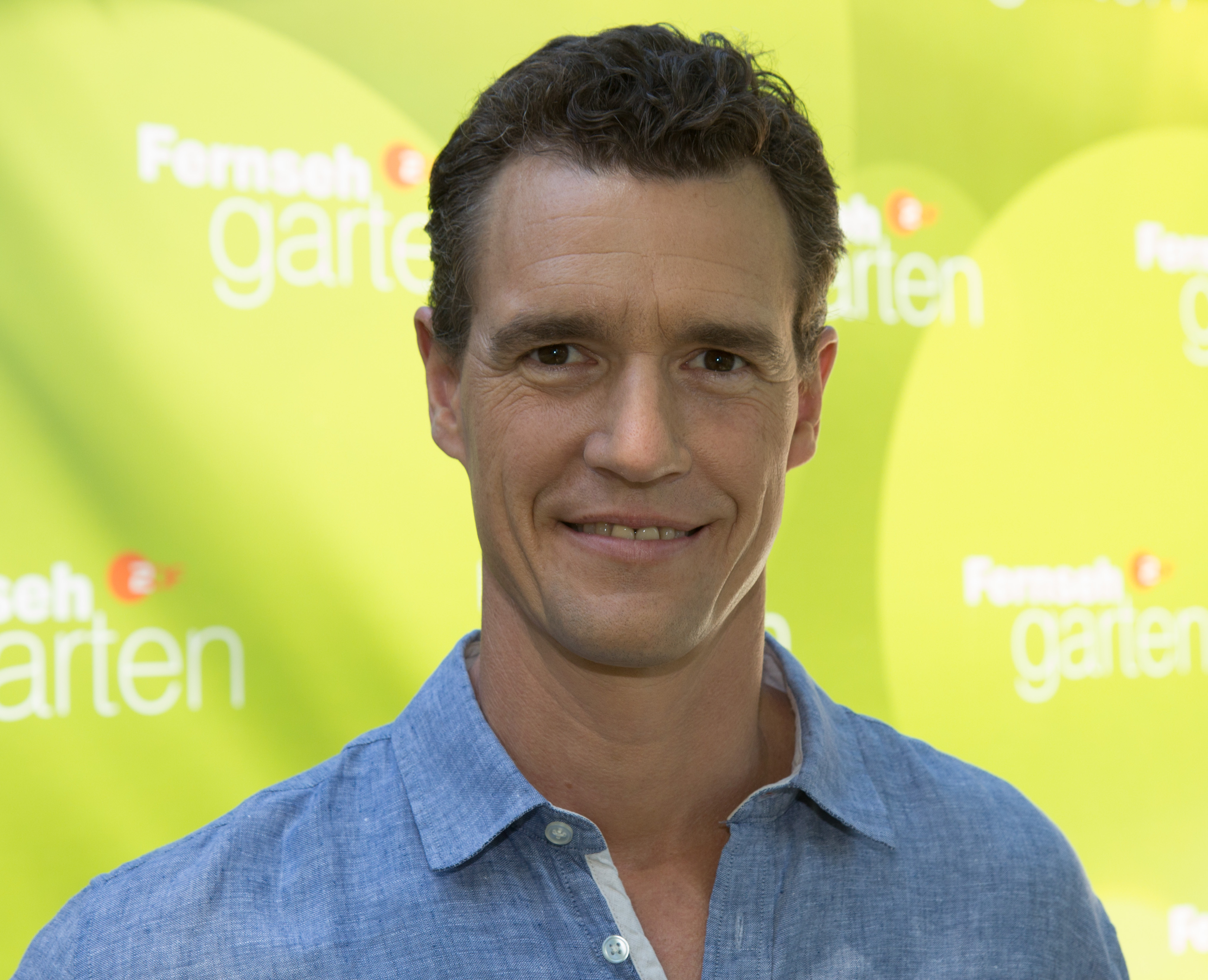 Tom Franz als Gast im ZDF-Fernsehgarten am 19. August 2018 in Mainz.